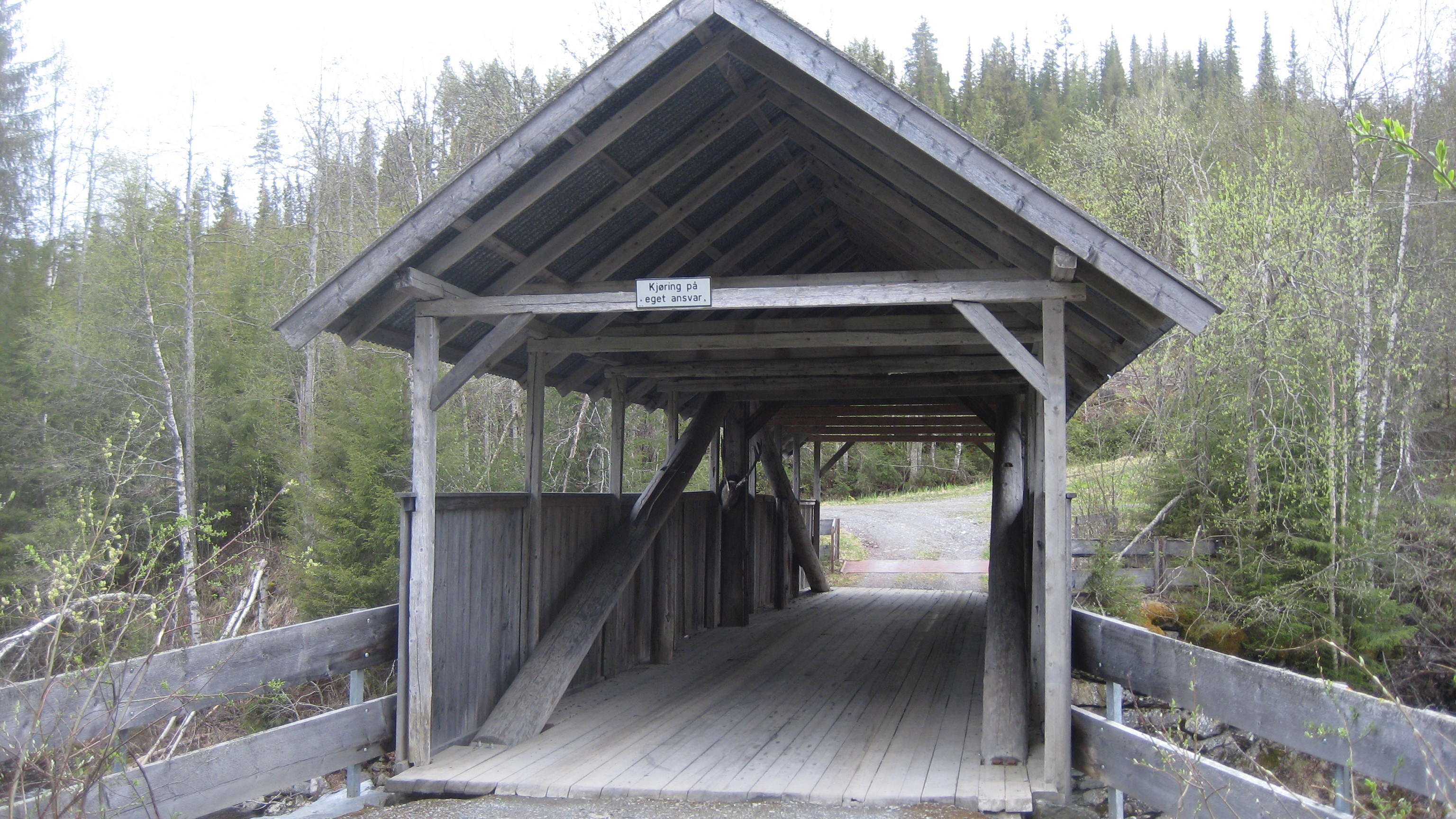 Flattum bru Torpa